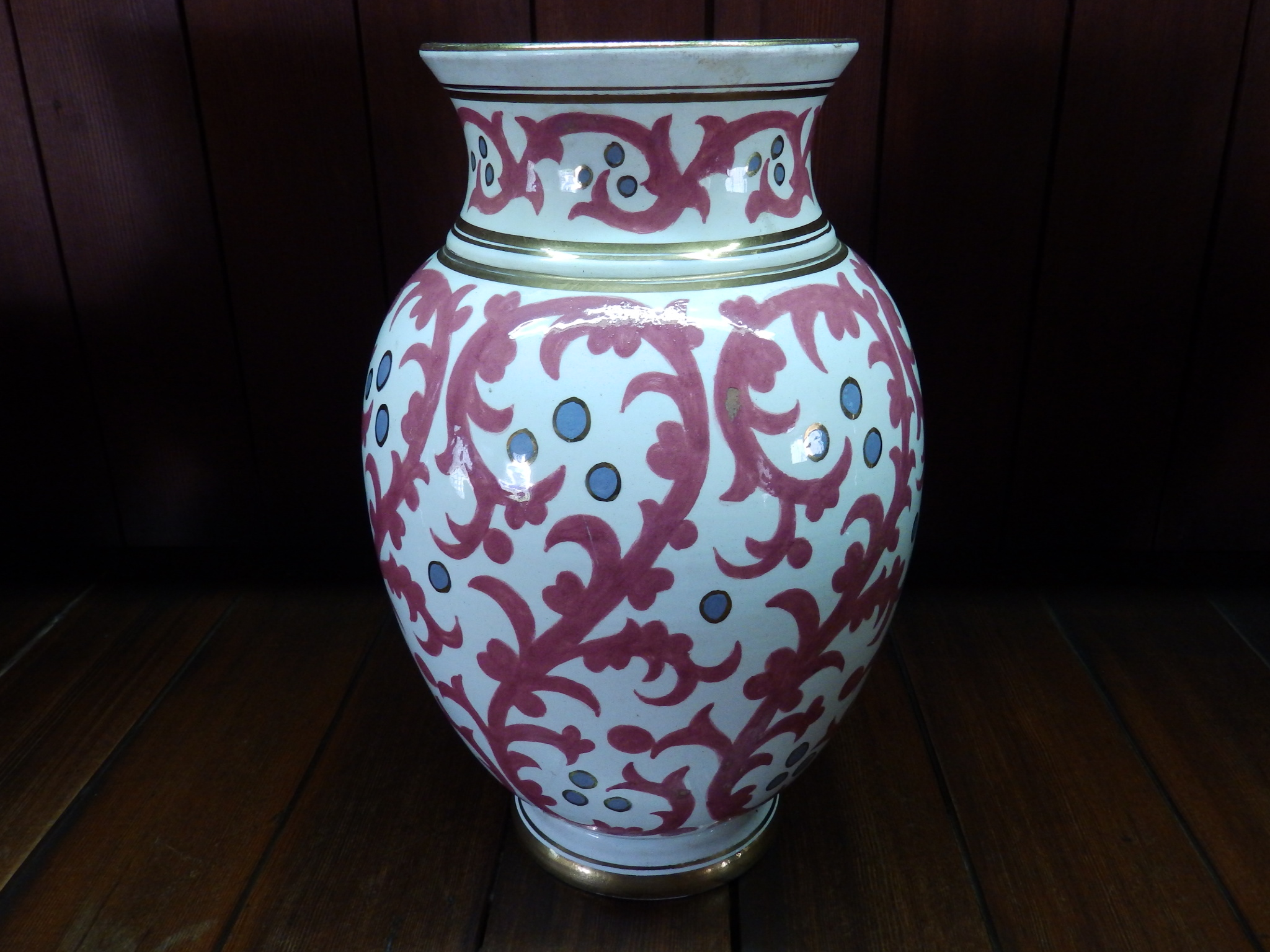 Παραγωγή εργοστασίου ΑΚΕΛ